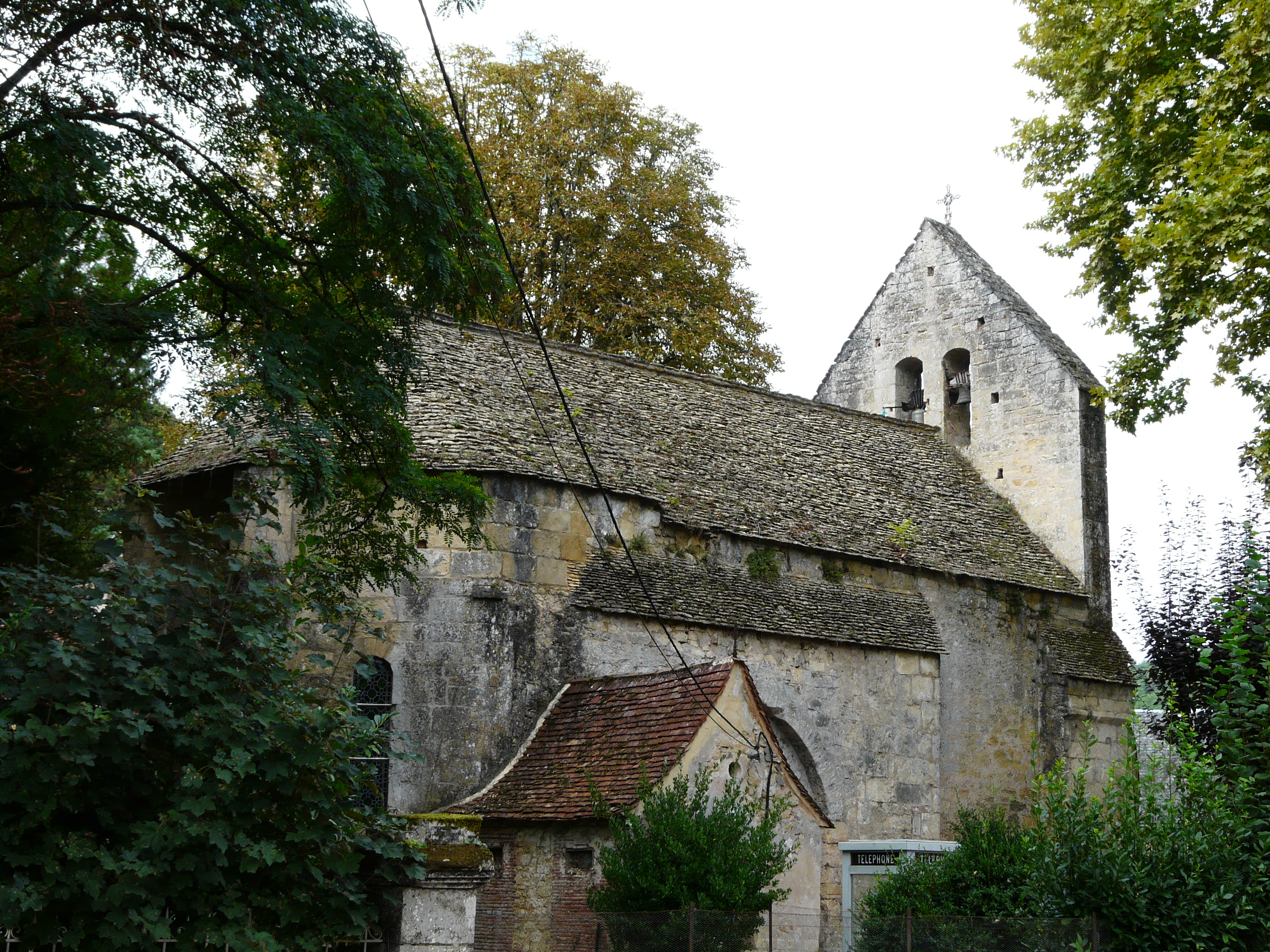 L'église Saint-Robert du Moustier vue du nord-est, Peyzac-le-Moustier, Dordogne, France. .